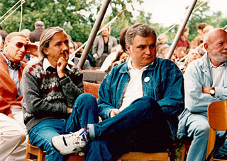 Lengyel László és Kéri László készülnek hozzászólni a kibontakozó vitához - Szárszói Találkozó 1994